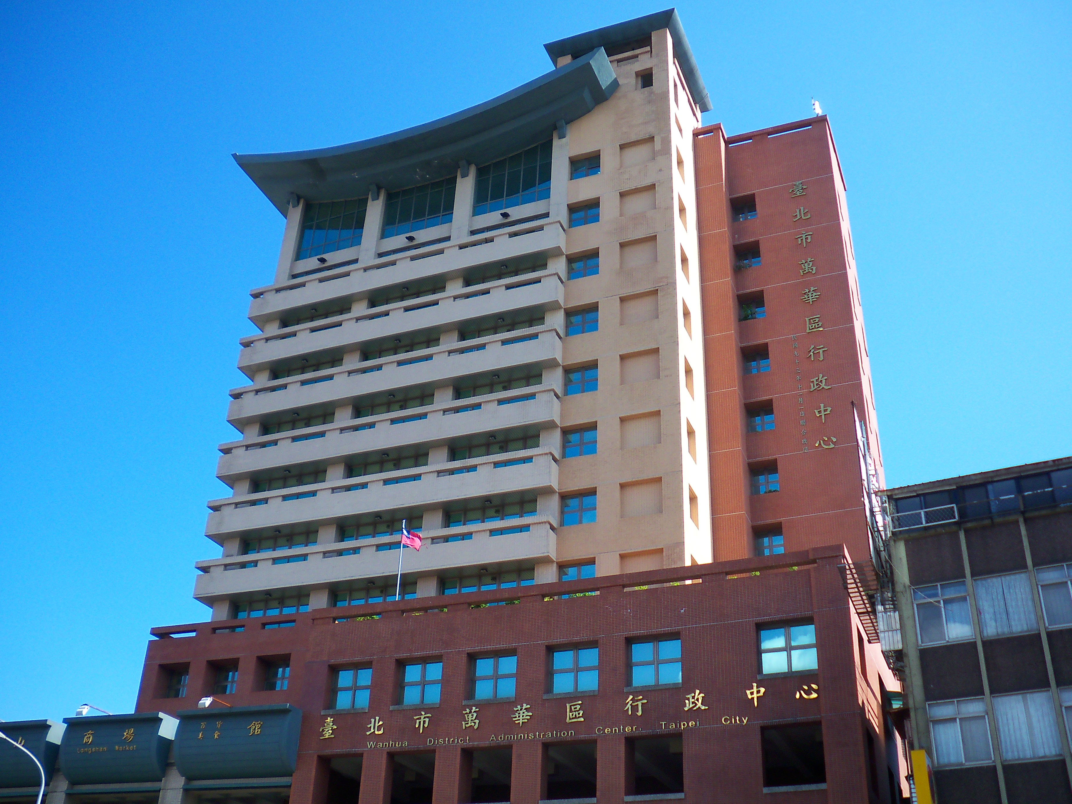 中文（台灣）: 臺北市萬華區行政中心。